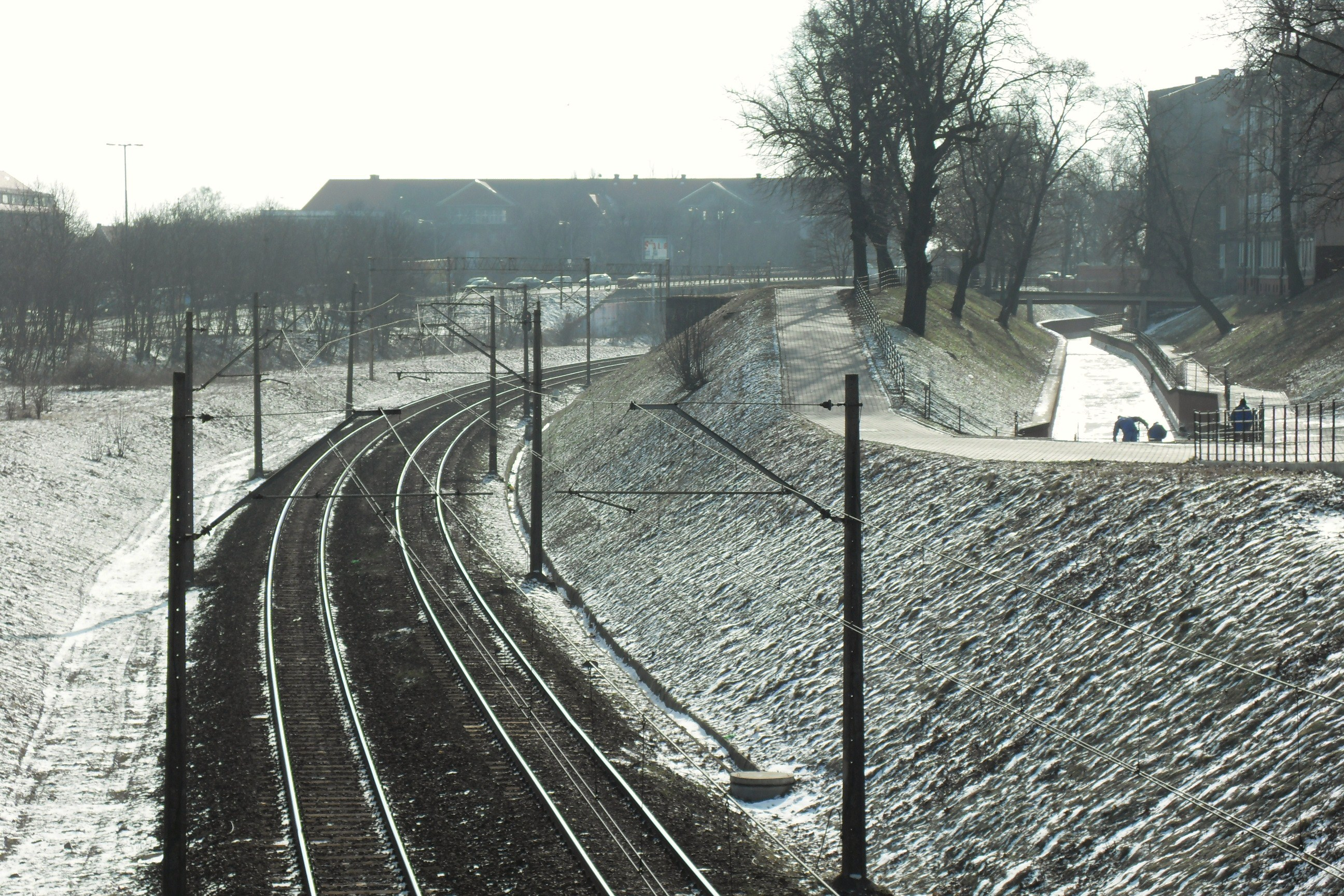 Gdańsk Zaroślak, po prawej zamarznięty Kanał Raduni. Widok w kierunku południowym.